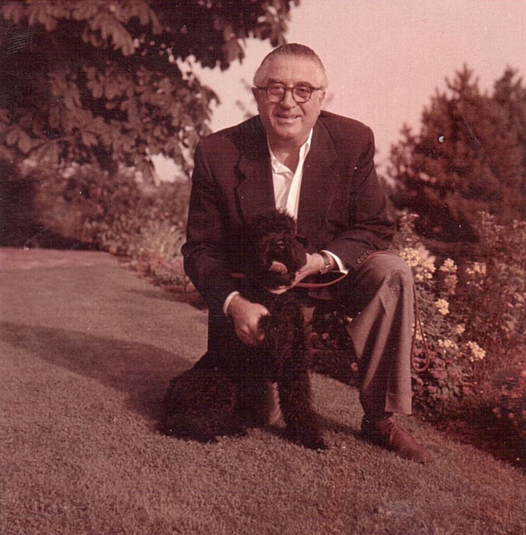 Richard Winkler (1898-1972). Deutscher Unternehmer aus Rengsdorf.